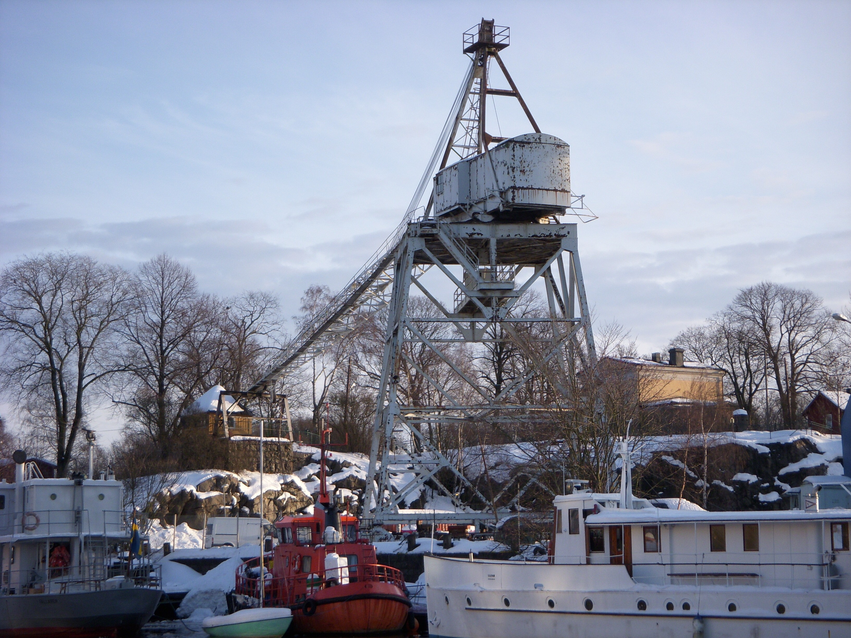 Washingtonkranen på Beckholmen